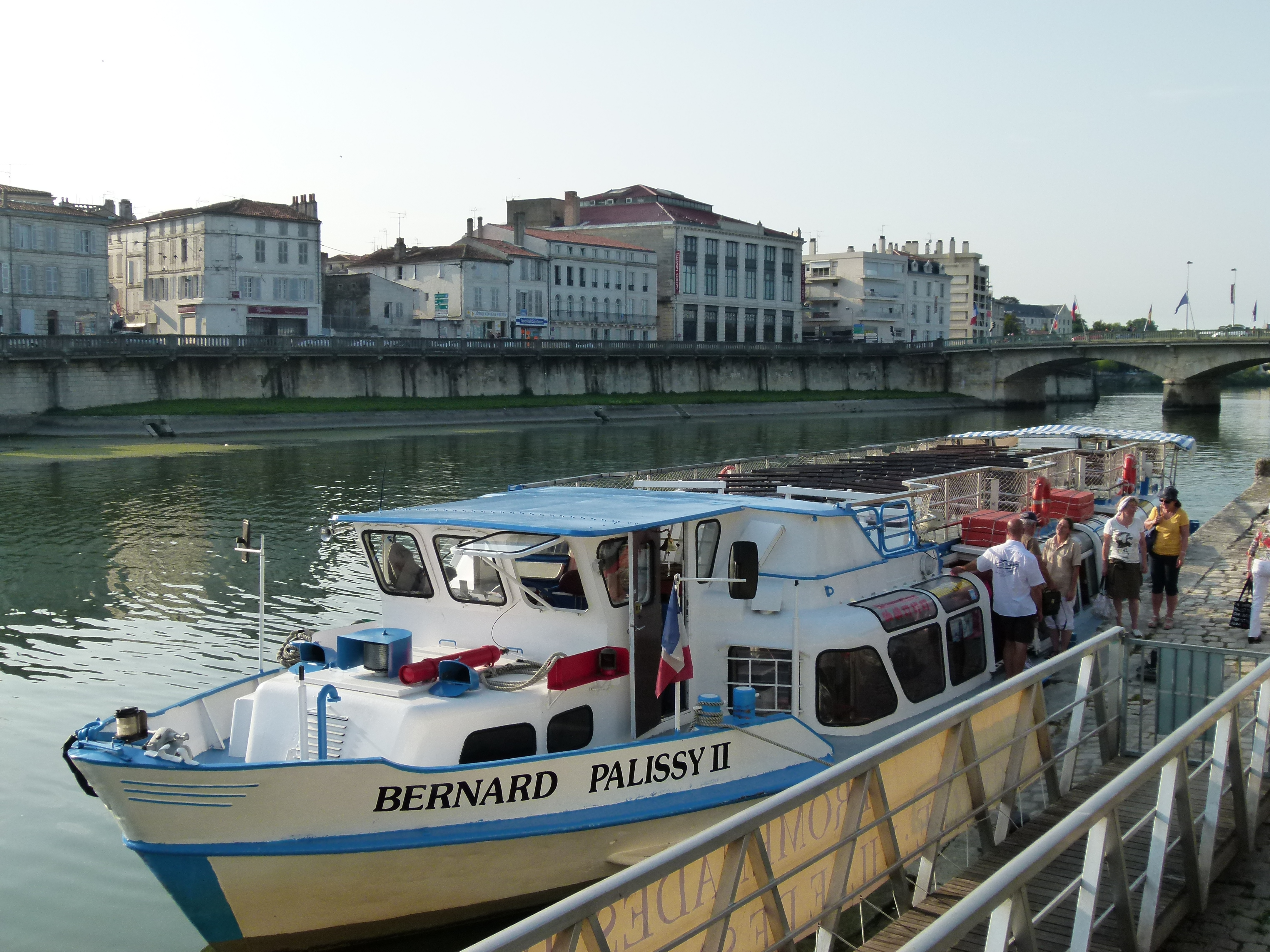 Le bateau-mouche "Bernard Palissy II" à quai à Saintes.